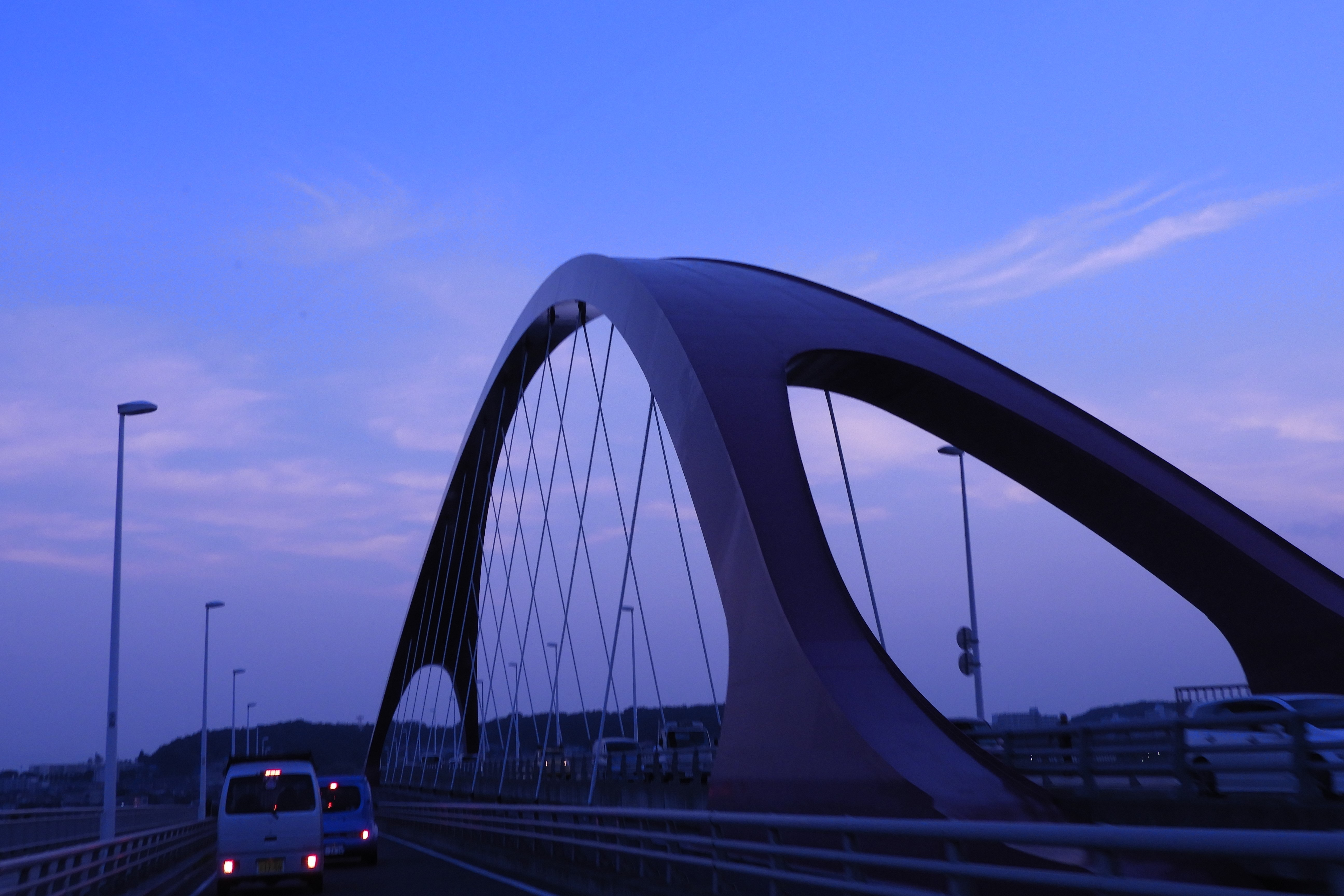 多摩大橋を車上から。 Nikon Coolpix B700